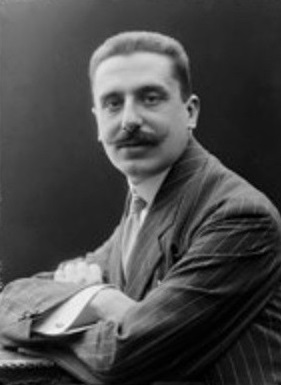 Diego Angeli